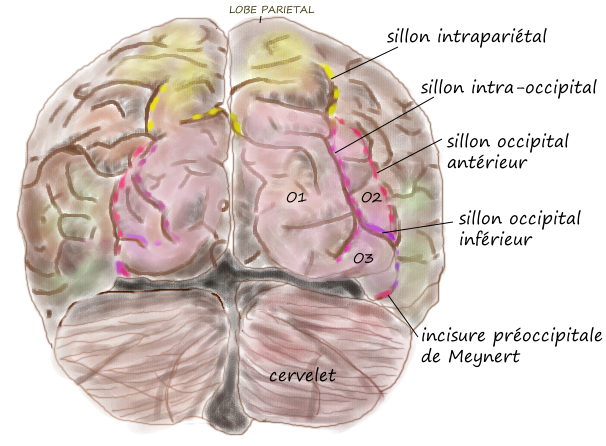 Vue de la face postérieure du cerveau ; sillons du lobe occipital dessin à la main (tablette + Artweaver) d'après pièce anatomique (Houdé)